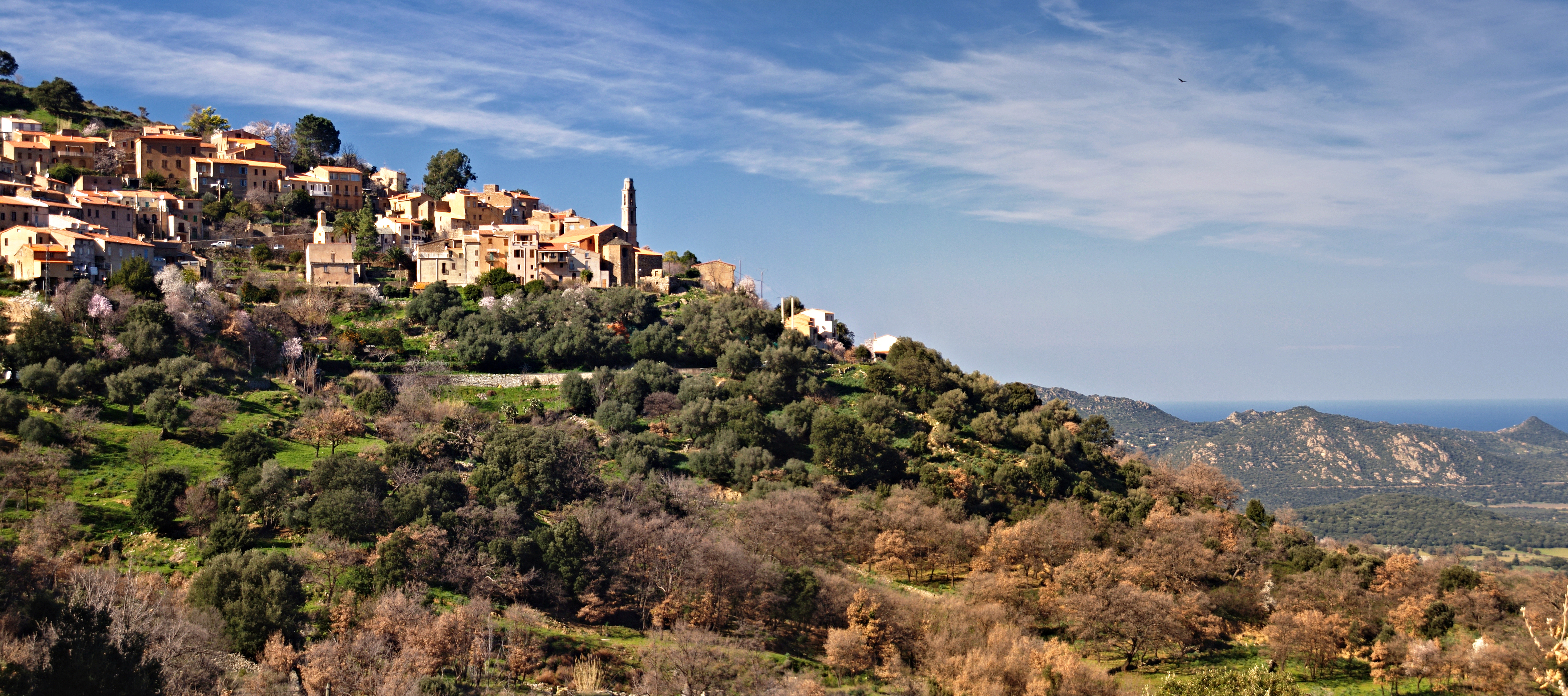 Occhiatana (Corsica) - Panorama sur le village